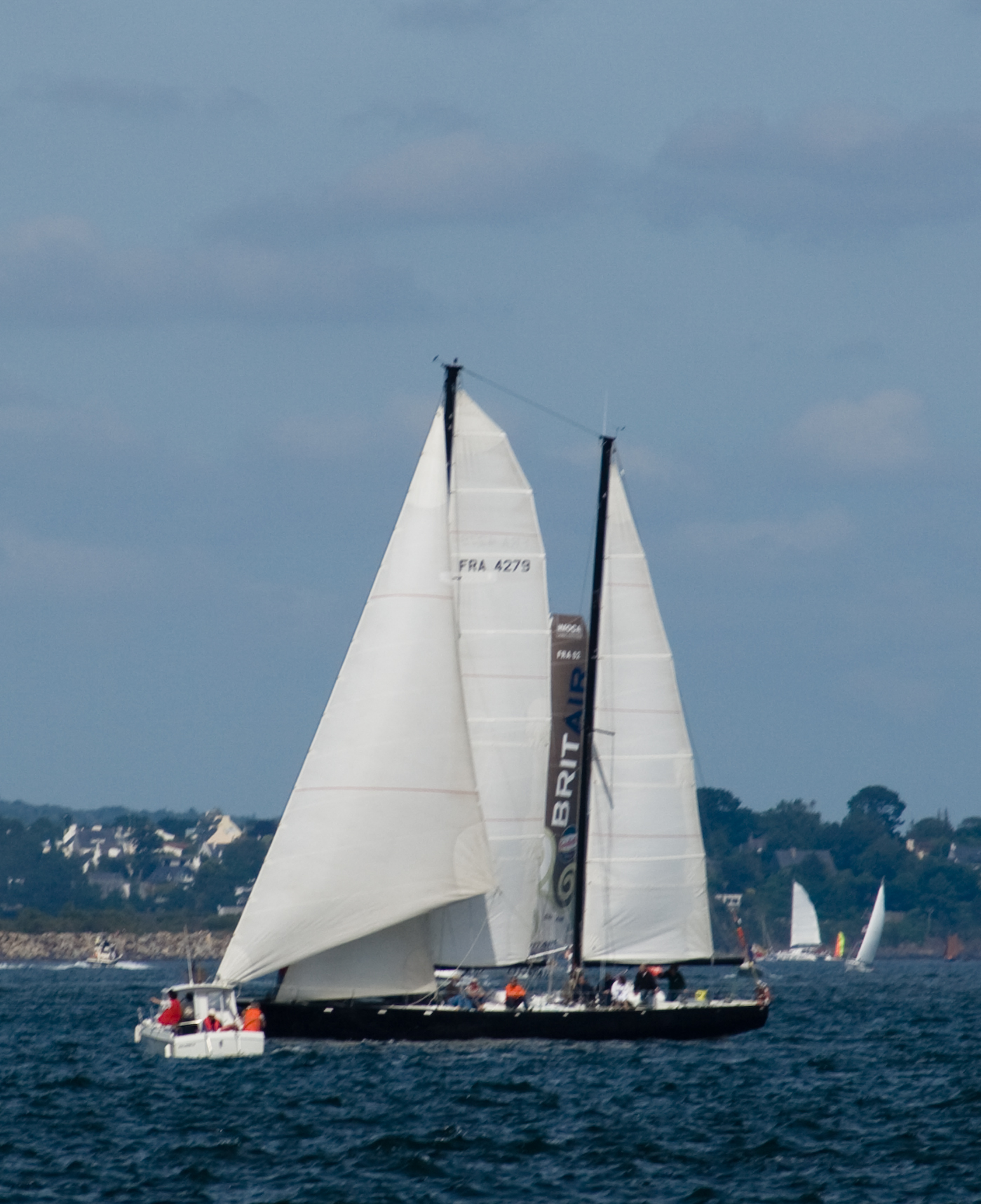 Pen Duick III, Brest 2008.